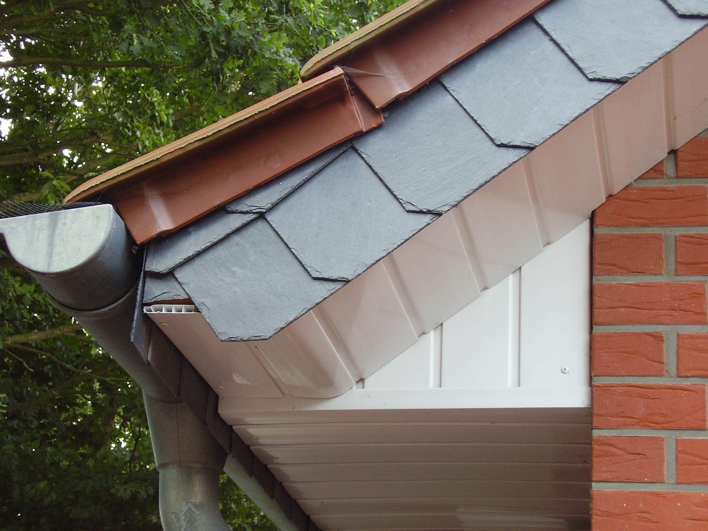 Dachkasten roof, house